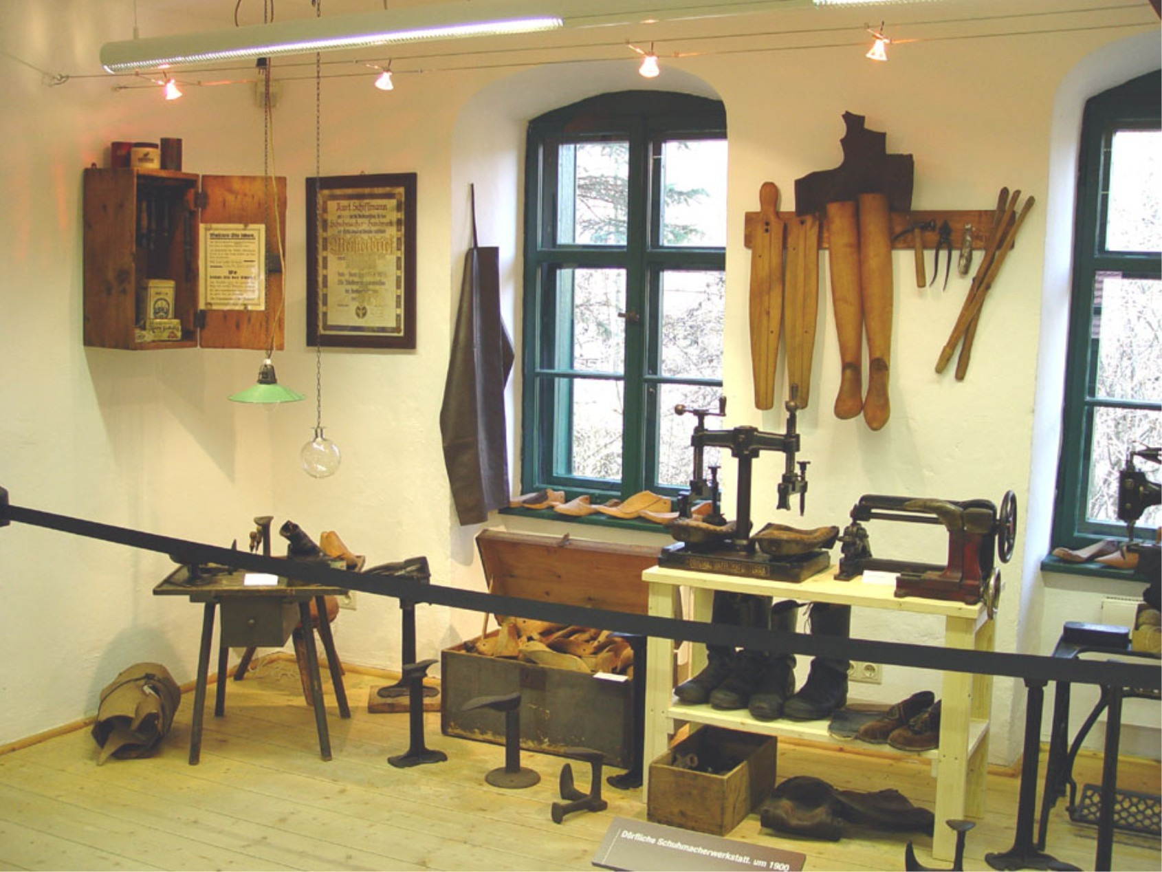 Schusterwerkstatt